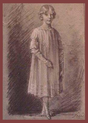 Charlotte future baronne de Talleyrand-Périgord, dessinée par P P Prud'hon , vers 1805